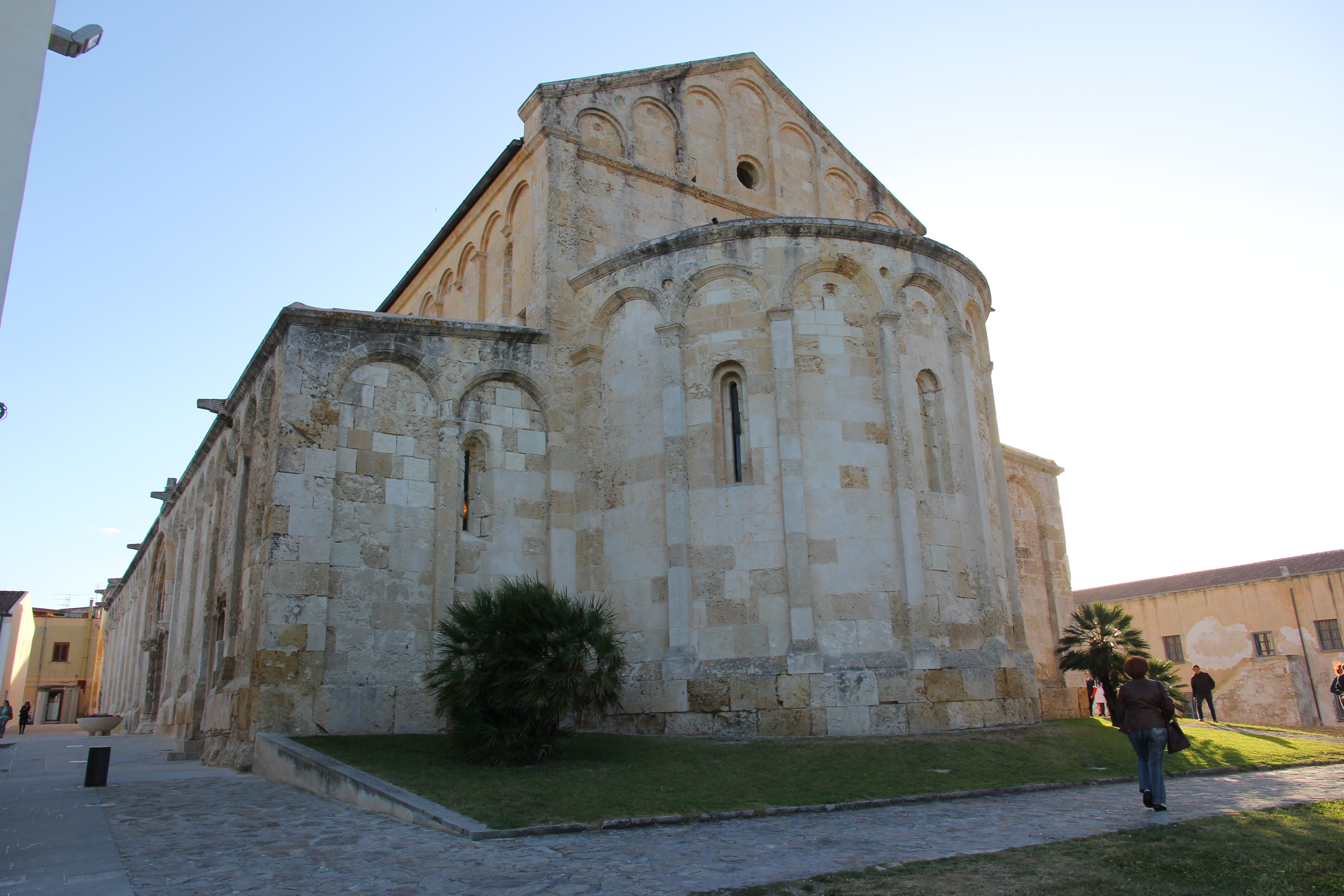 Porto Torres - Basilica romanica di San Gavino